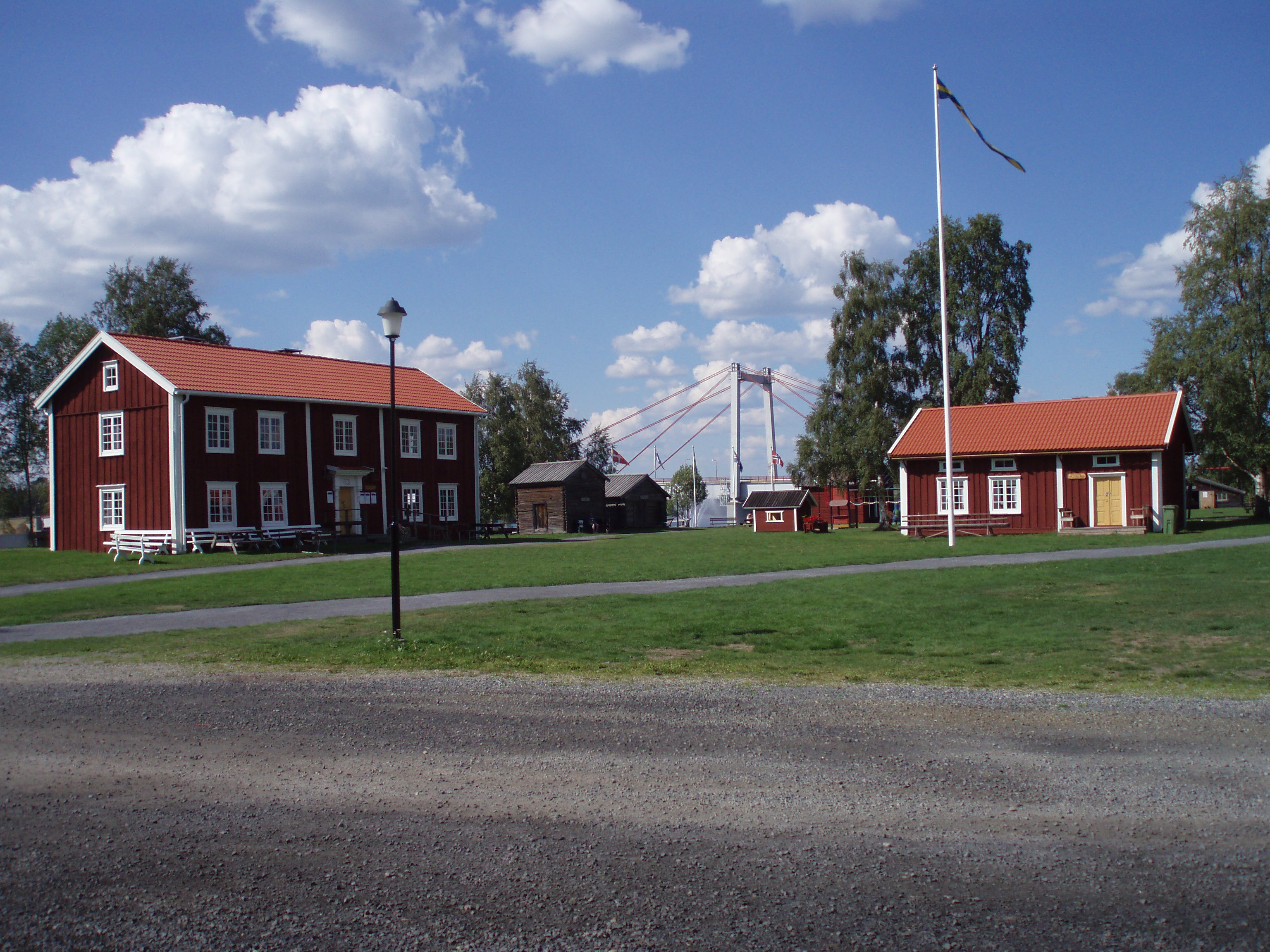 Strömsund, Sweden, Hembygsgården. Photo taken in aug. 2006 by me - User:Cucumber